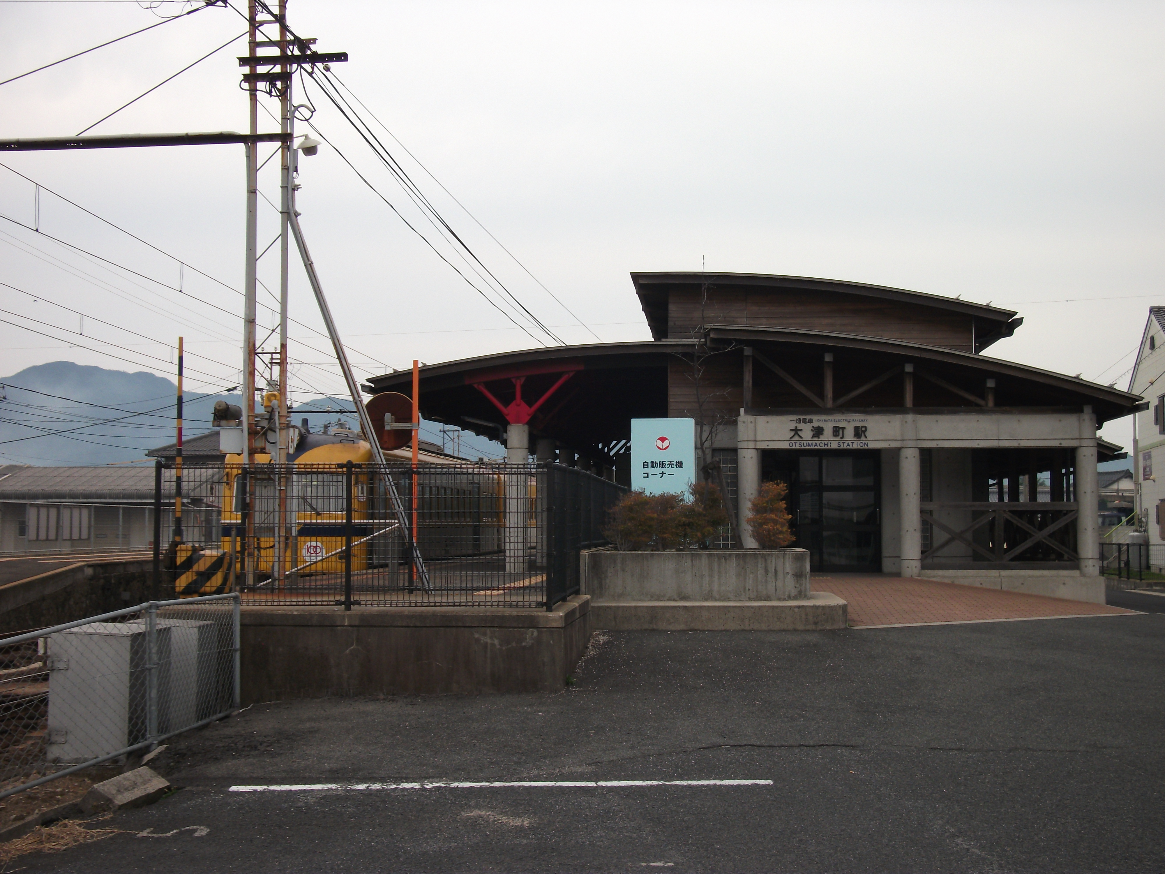 大津町駅